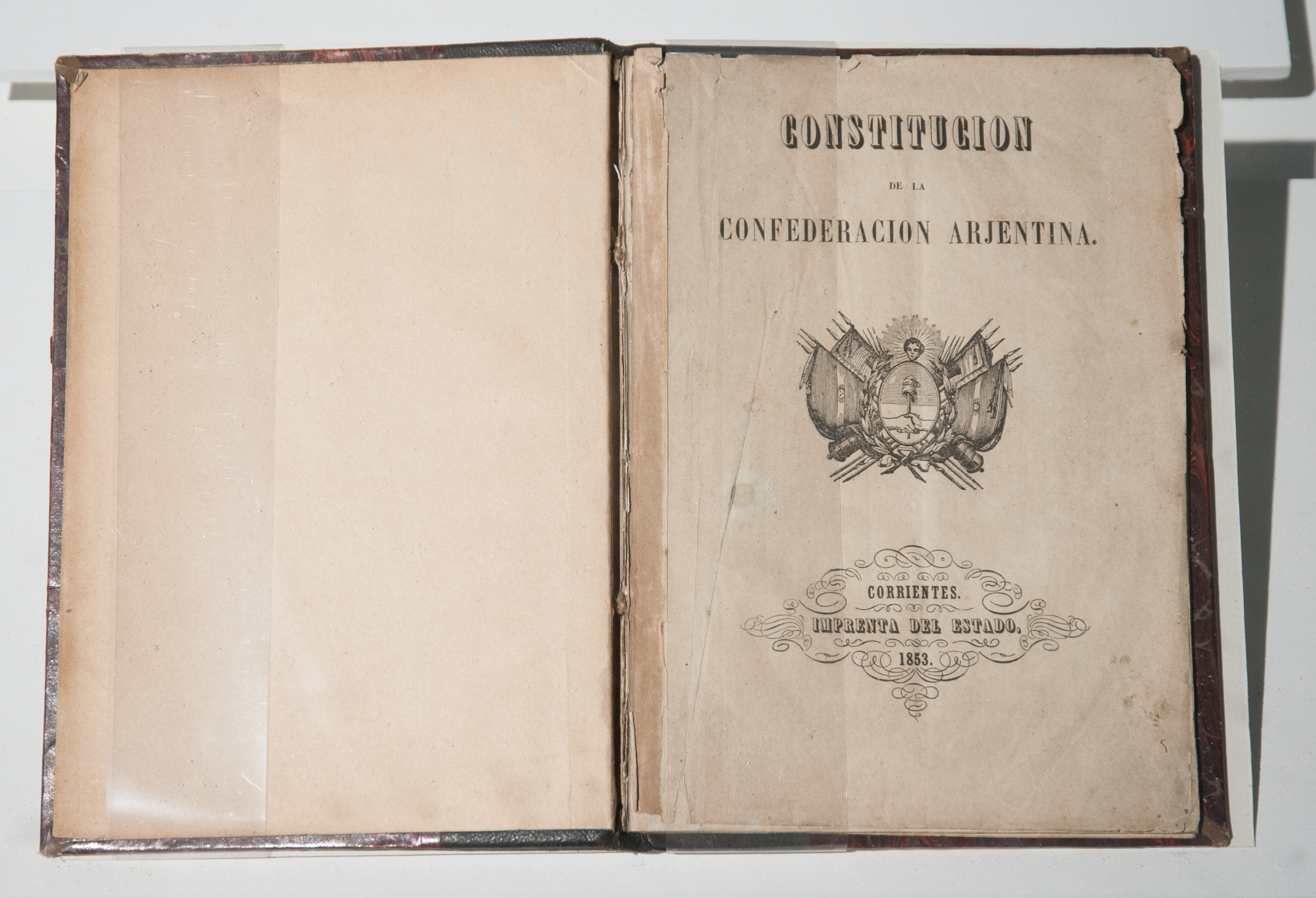 Ejemplar impreso en el año 1869, a poco de sancionarse en Santa Fe la Carta Magna Argentina, por la Asamblea General Constituyente.